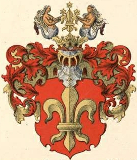 Korffi suguvõsa aadli- ja parunivapp ning Schmysingk gen. Korffi suguvõsa parunivapp